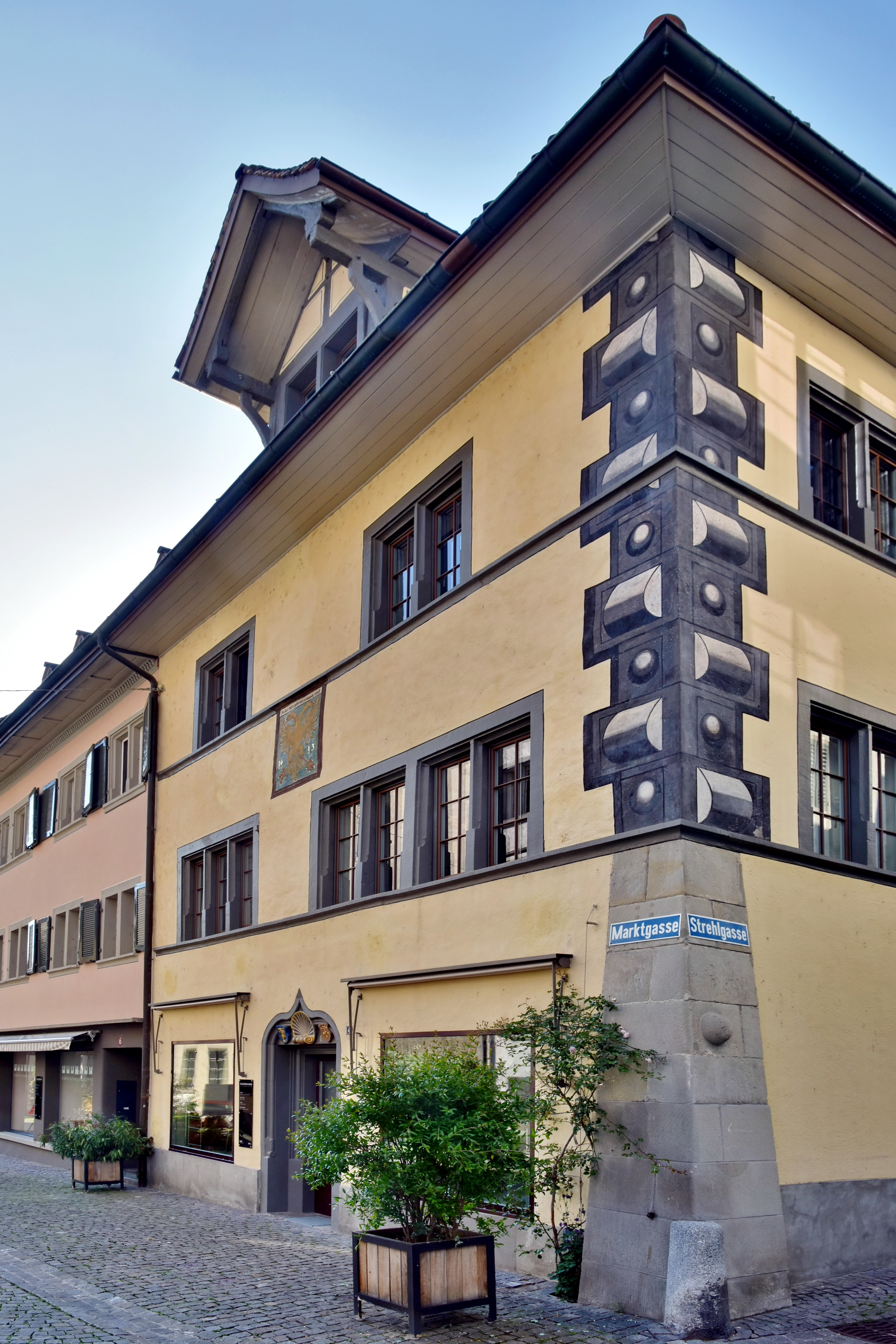 Haus zum Goldenen Adler where Marianna Ehrmann-Brentano was born, Marktgasse in Rapperswil (Switzerland)